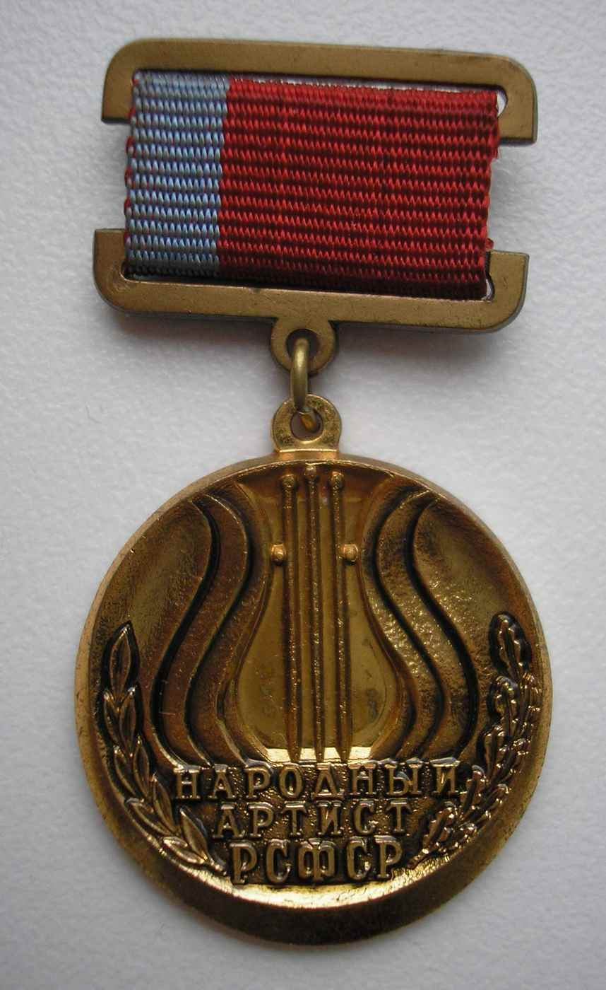 нагрудный знак «Народный артист РСФСР»